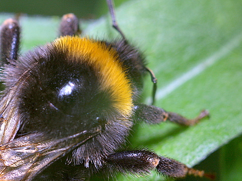 Pelz der Hummel - OlympusE-500 mit Balgengerät Soligor und Schneider Componar-C